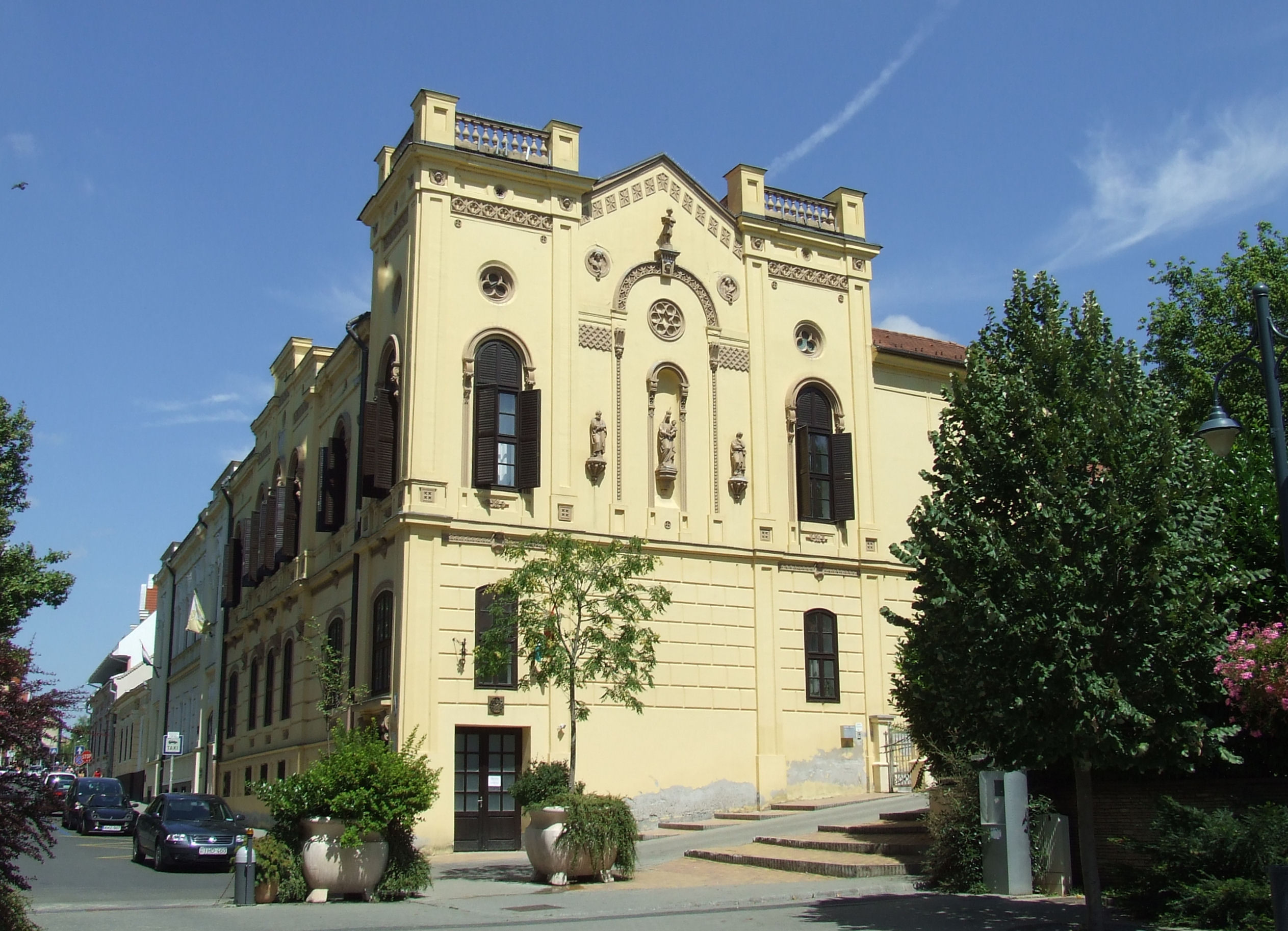 A volt zárda épülete Kaposváron. Épült 1873-ban romantikus stílusban, Deckert Krisztián tervei alapján. Ma a katolikus gimnázium épülete